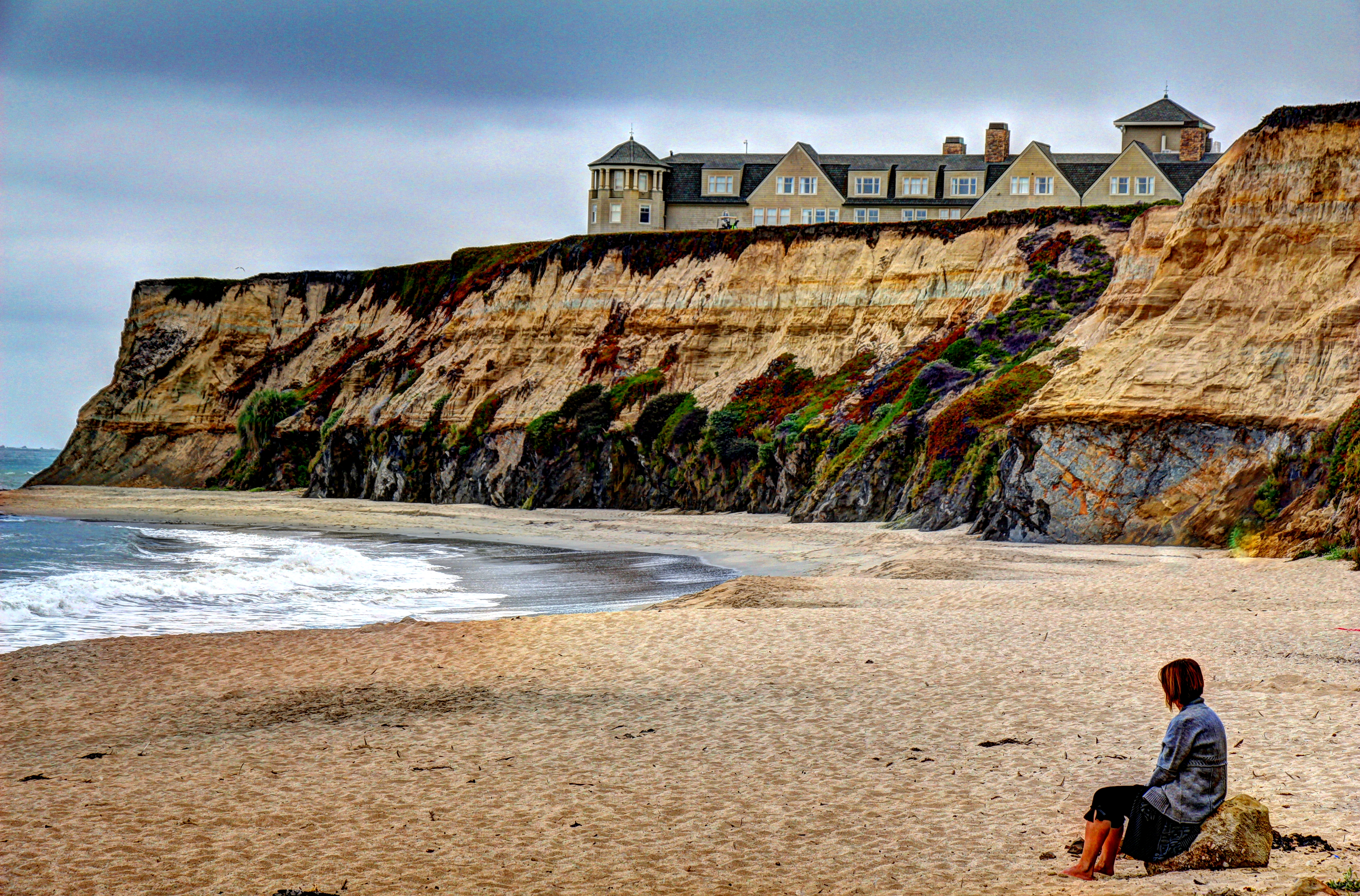 Blick über den Half Moon Bay auf das Ritz-Carlton Hotel.